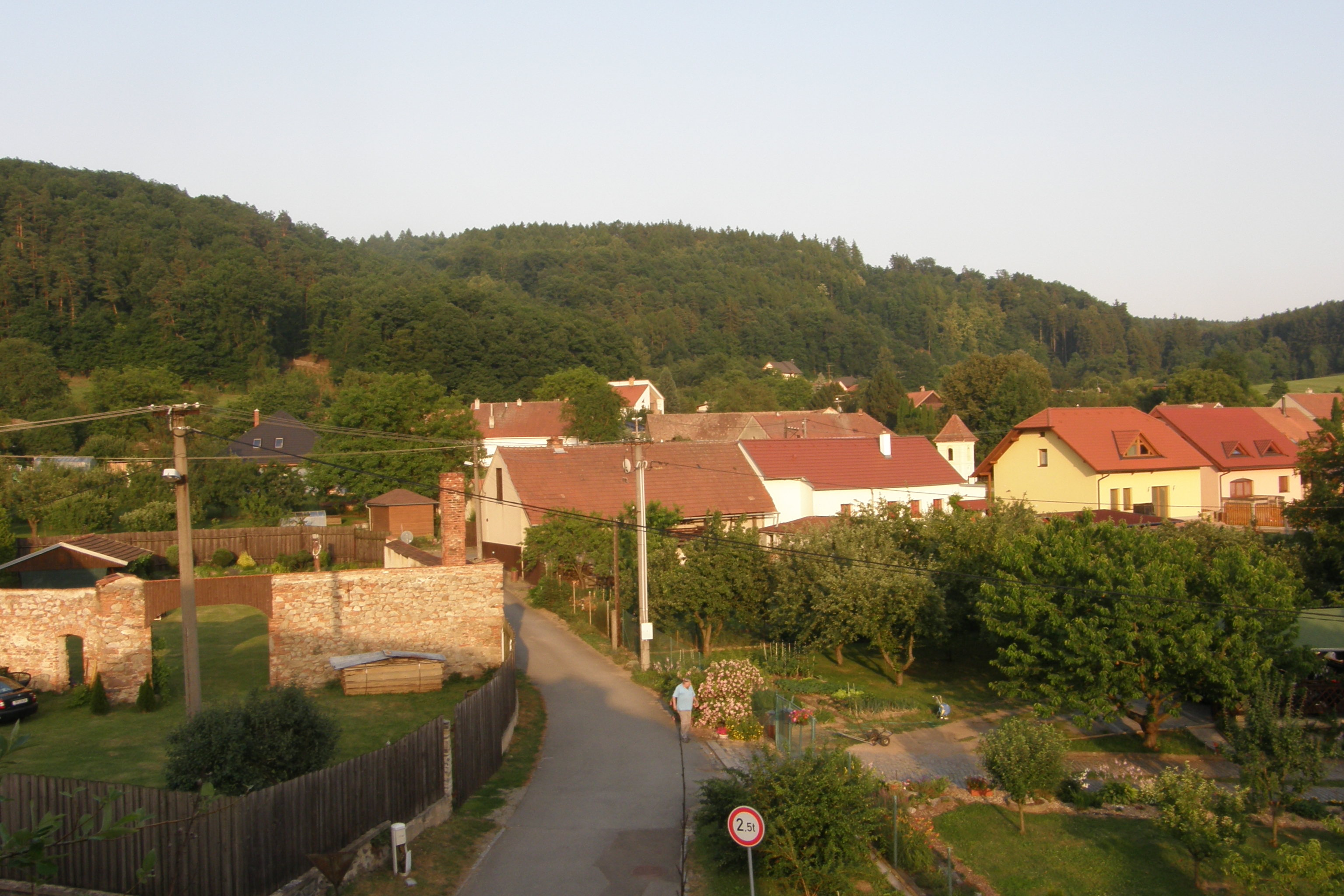 Obec Milonice v okrese Blansko